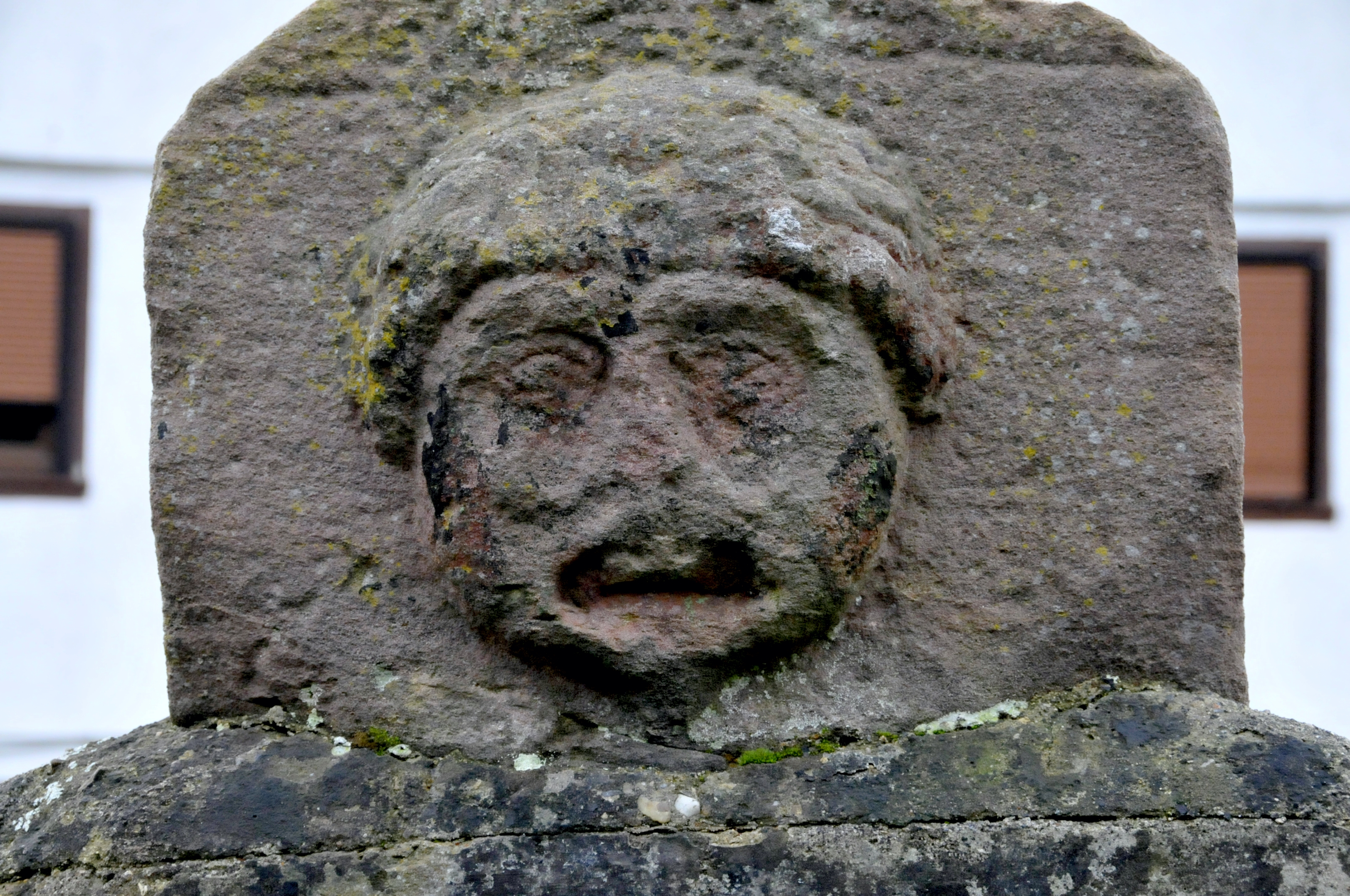 Luttershof (Vacha), Halbrelief auf einem Torpfosten